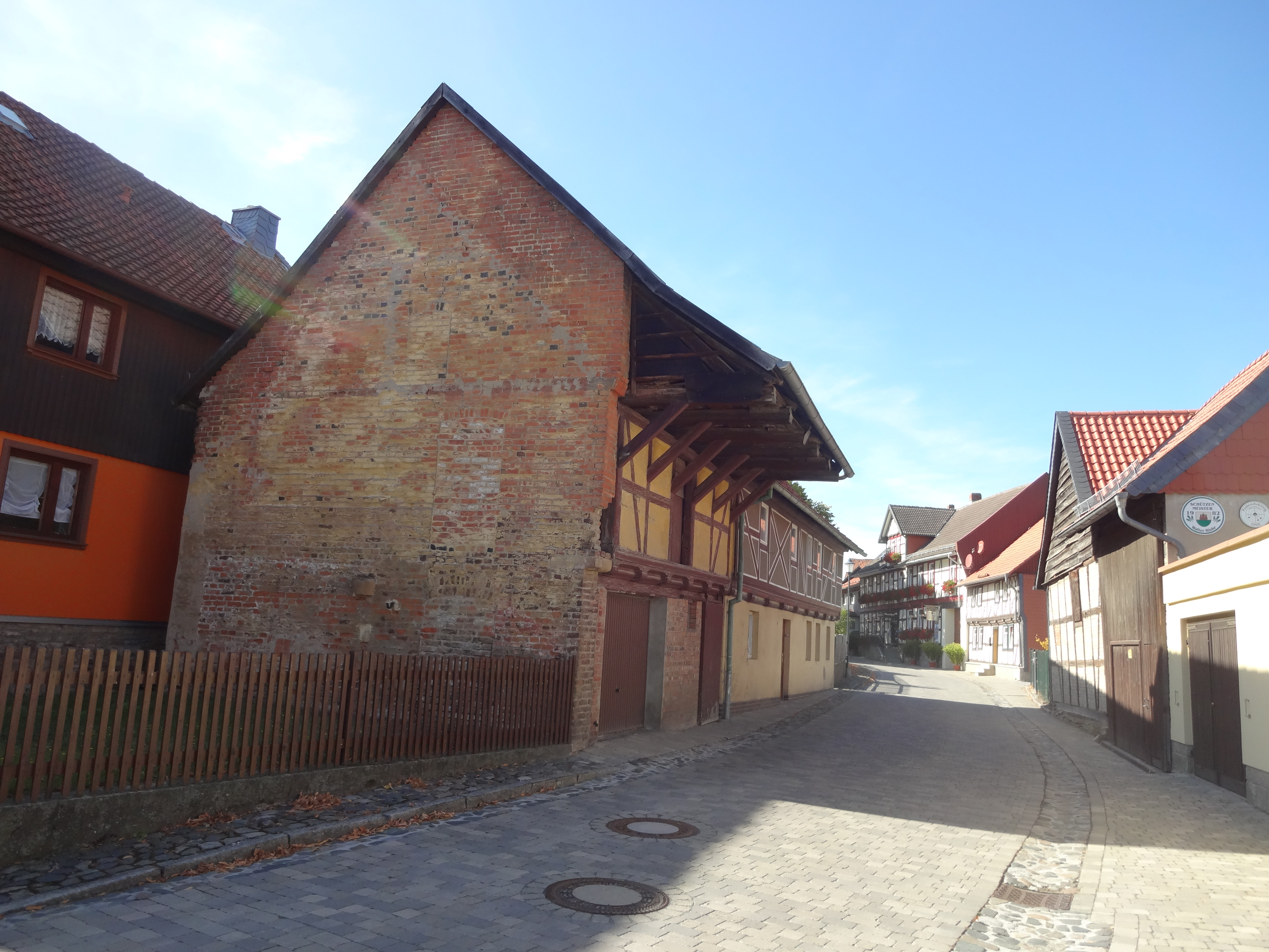 denkmalgeschützter Bauernhof in der Hauptstraße 10 in Drübeck